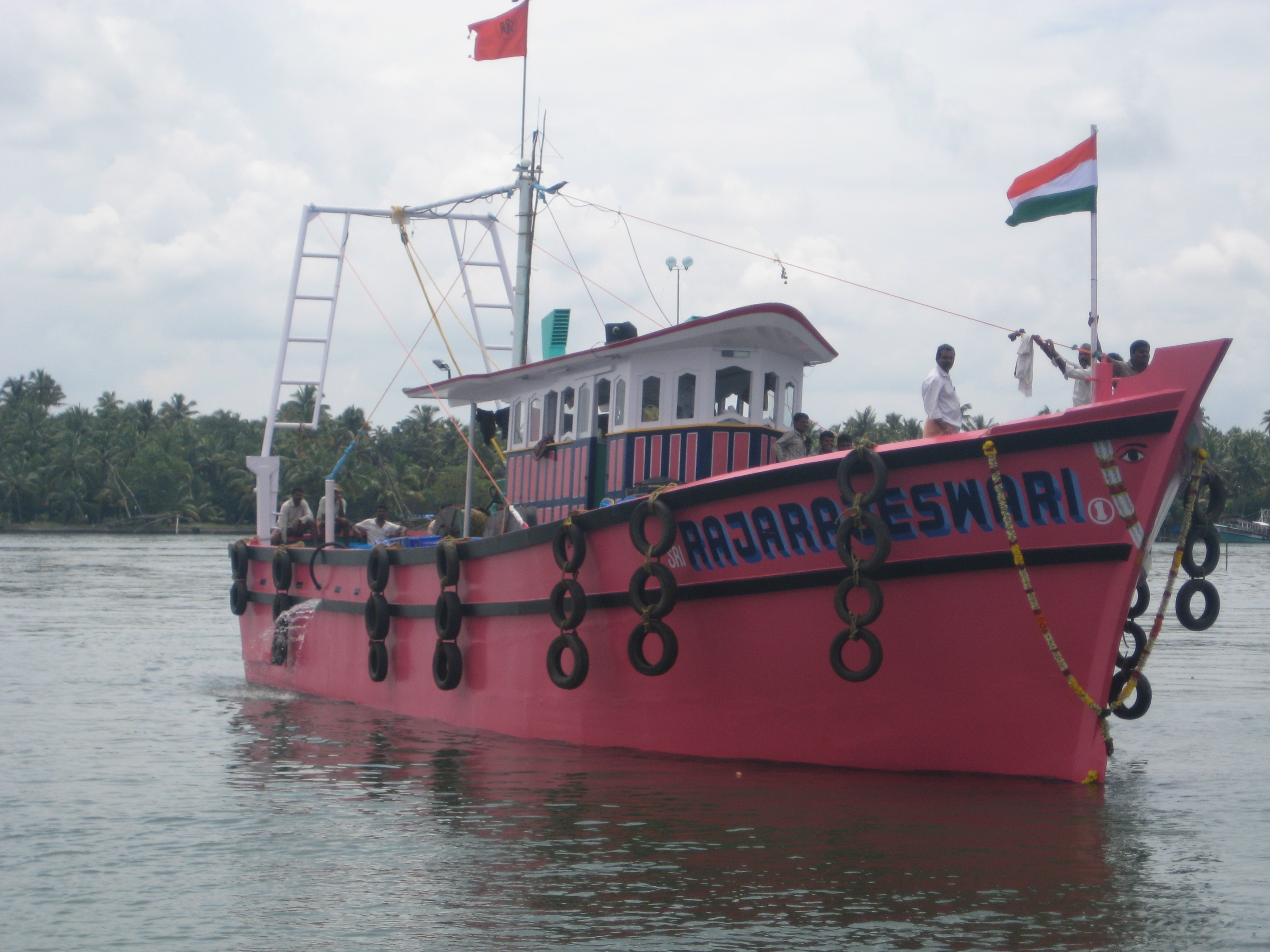 മൽസ്യതൊഴിലാളികൾ ആഴക്കടലിൽ മൽസ്യബന്ധനത്തിന് പോകുന്ന ഒരു നൗക (ബോട്ട്).